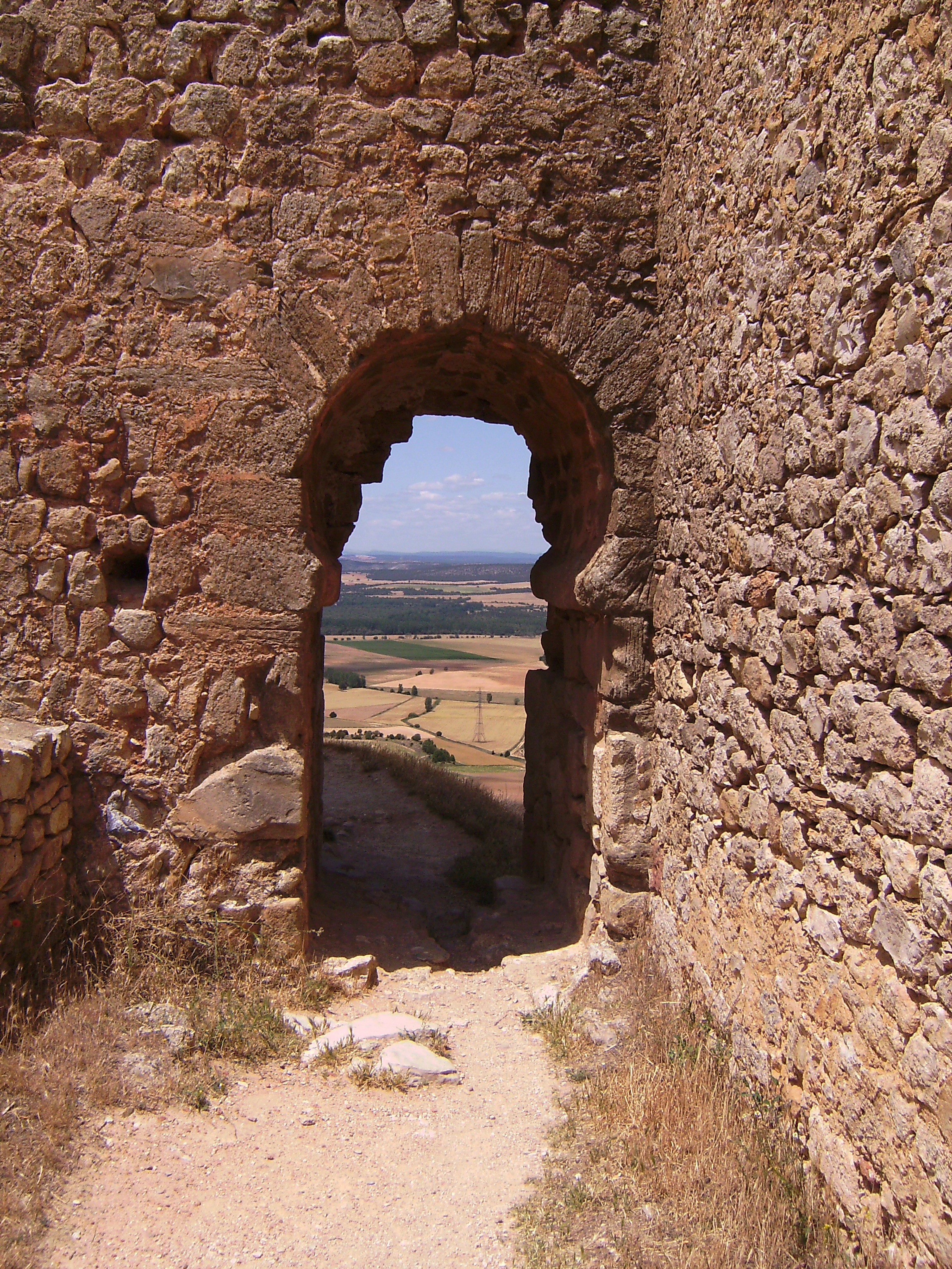 Gormaz - Castillo (Puerta del Alcazar)